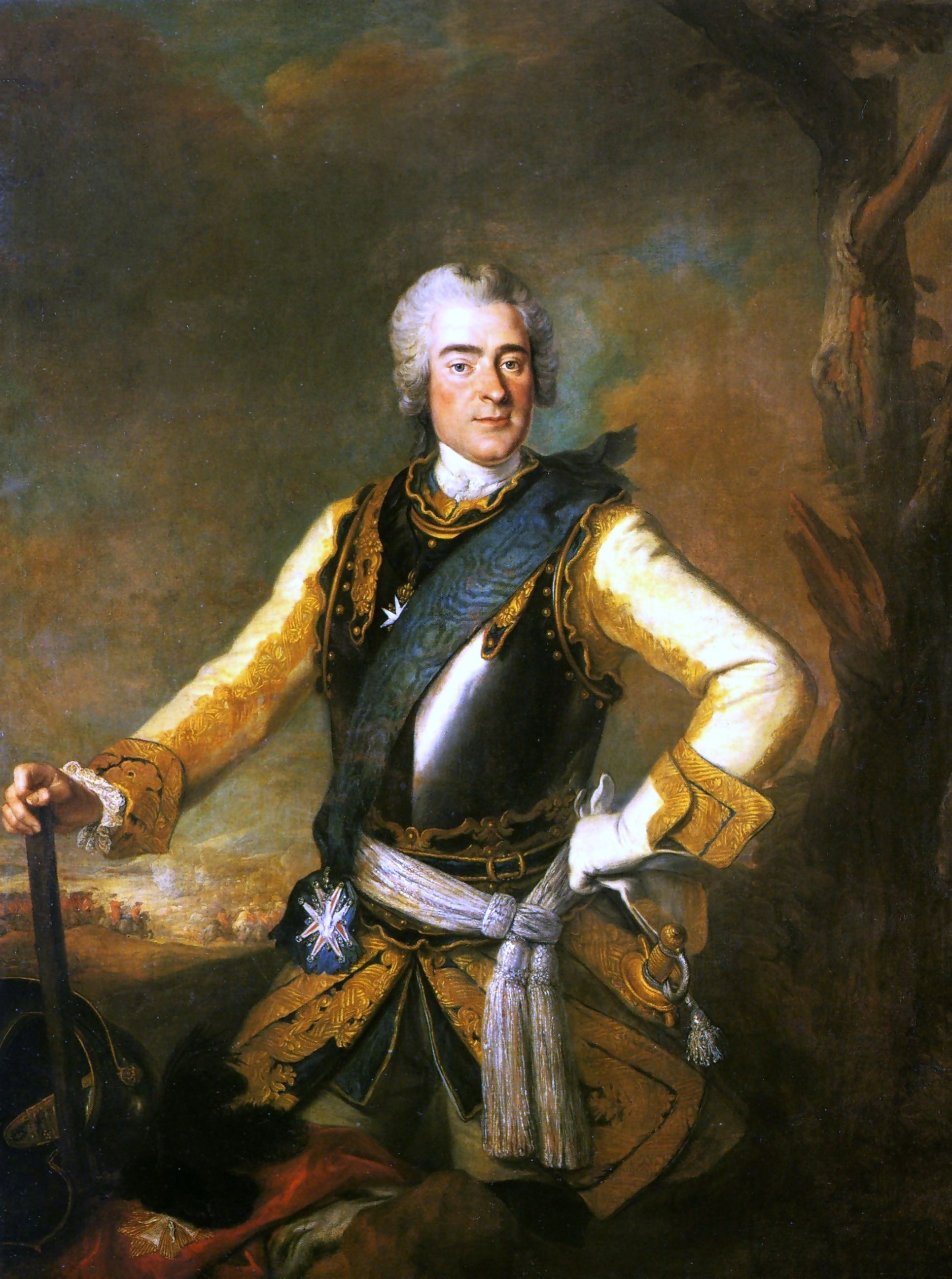 Johann George Chevalier de Saxe. Bez. auf der Rückseite: peint par Louis de Silvestre a Dresde 1744. Öl auf Leinwand, 155 x 121 cm. Dresden Gemäldegalerie Alte Meister, Gal. Nr. 3964